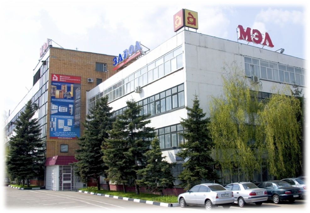 Фотография завода МЭЛ, сделанная мной, лето 2009г.